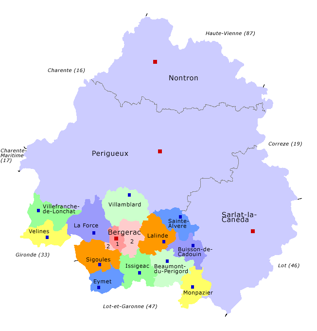 Arrondissement Bergerac mit Verwaltungsgiederung und Lage im Département Dordogne